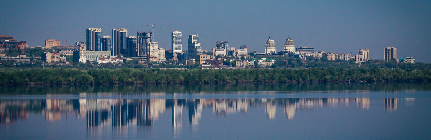 вид на місто зі сторони Південного мосту